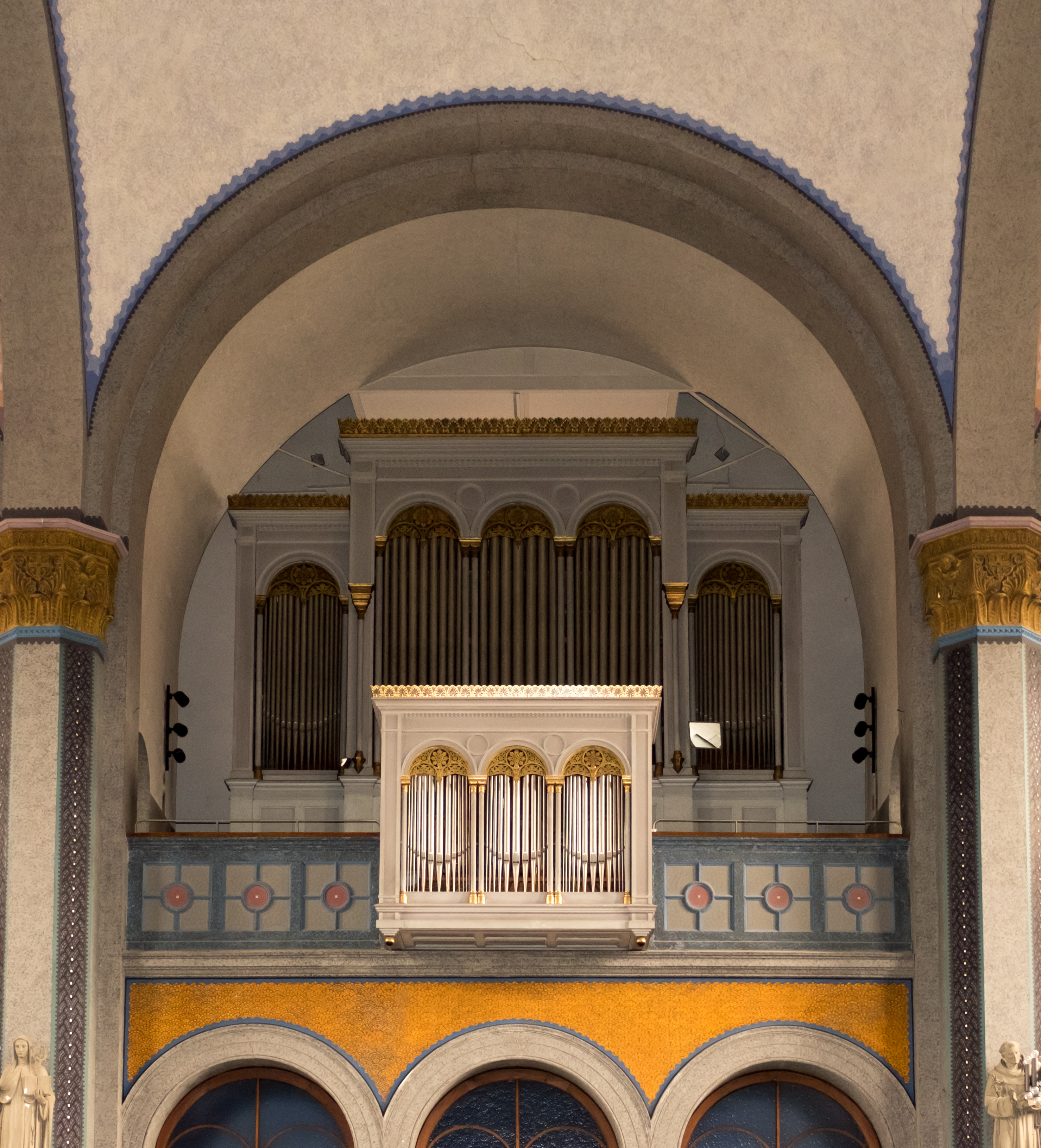 Orgel der Pfarrkirche St. Johannes ("Taunusdom") in Bad Homburg-Kirdorf